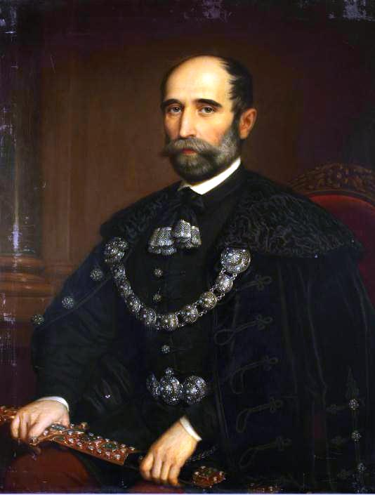 Bittó István (1822–1903) politikus, miniszterelnök portréja. Barabás Miklós festménye (1875)